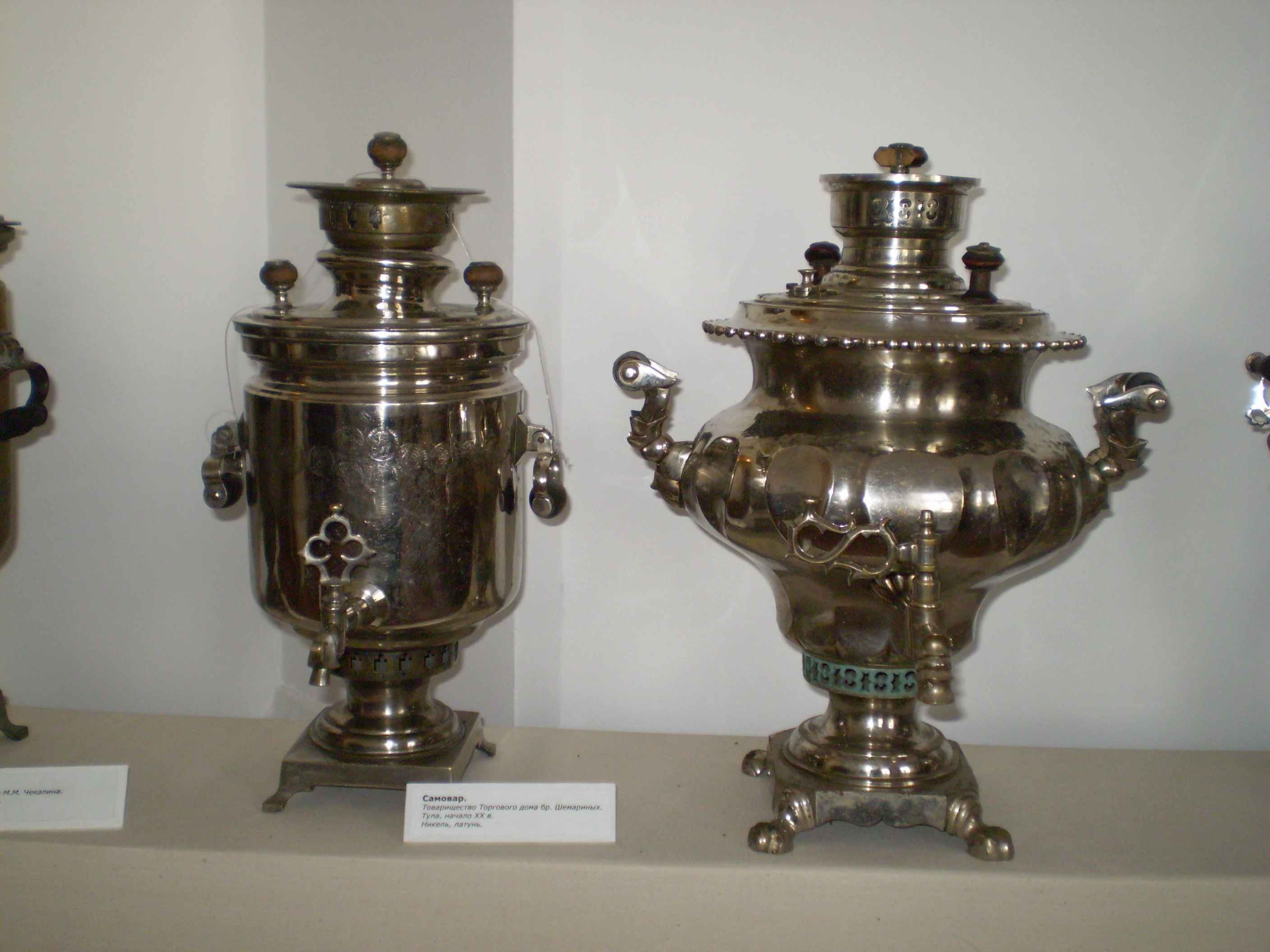 Самовар Товарищества Торгового дома братьев Шемариных. Тула, начало XX века. Музей истории города Улан-Удэ